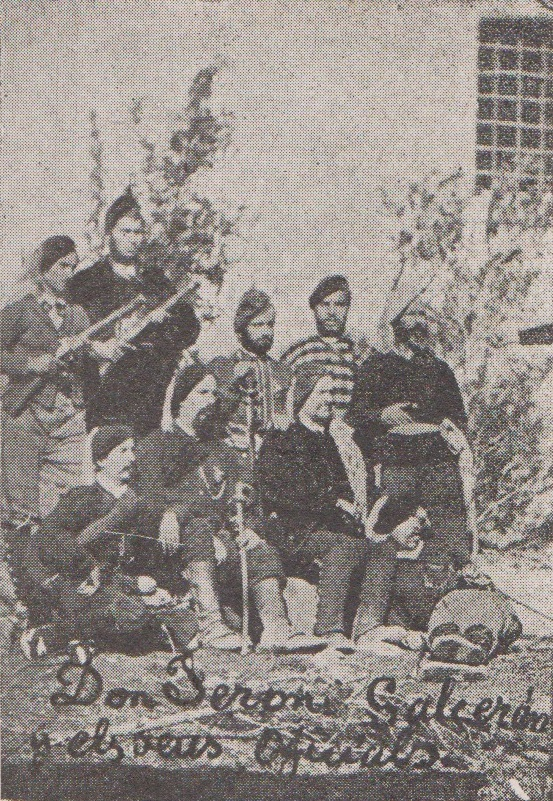 Don Jeroni Galcerán y els seus Oficials